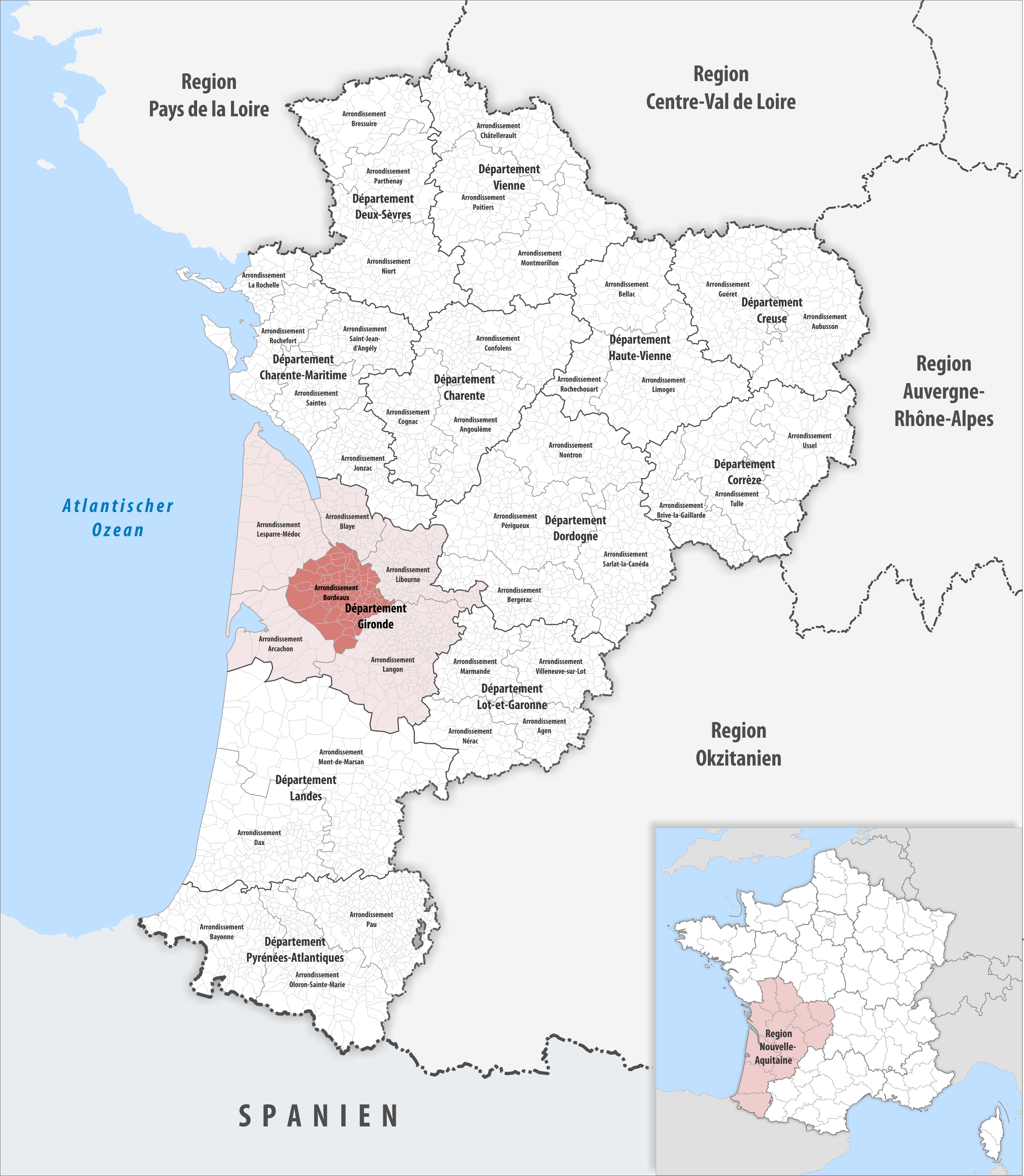 Lage des Arrondissements Bordeaux